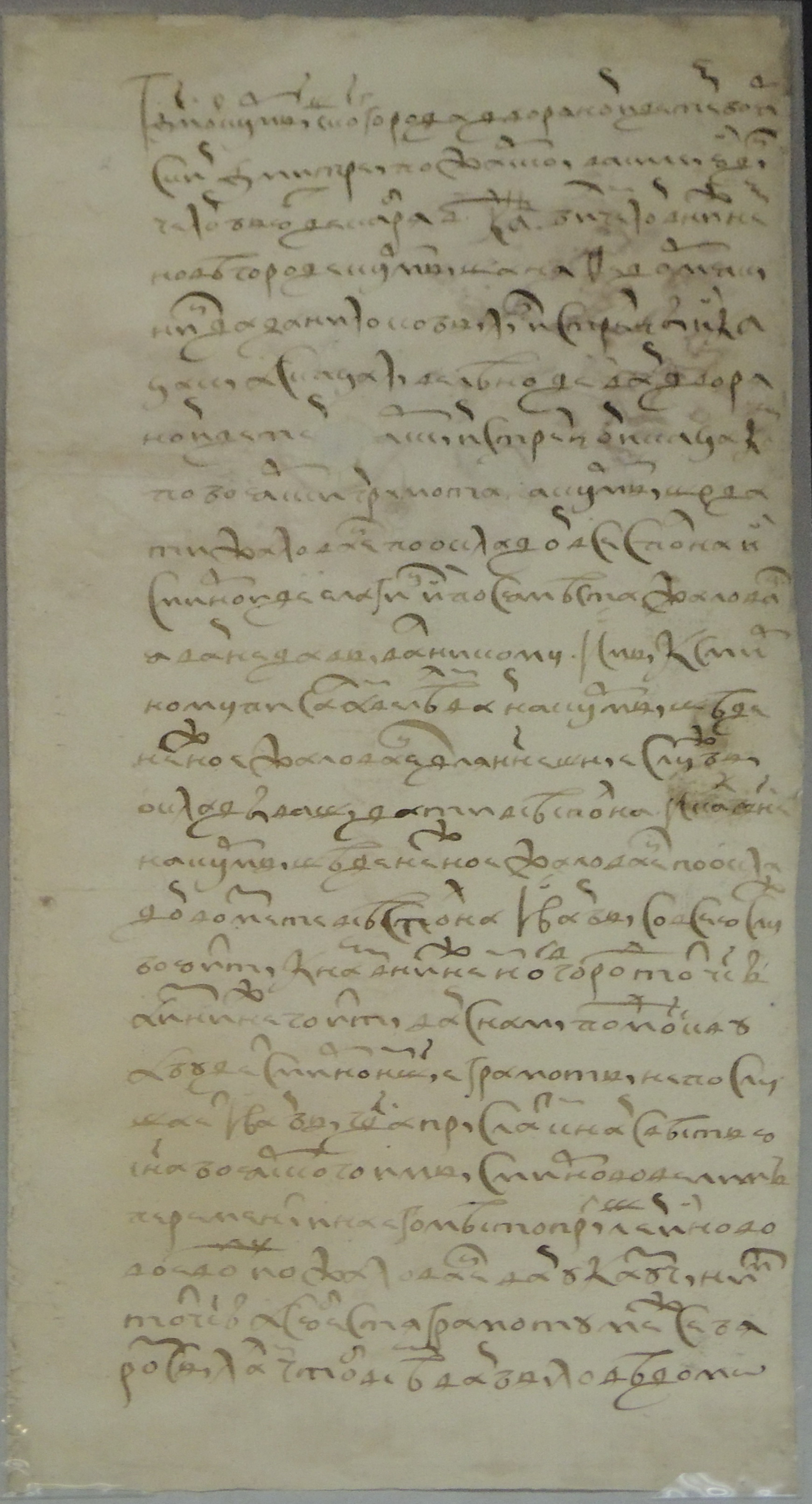 Грамота князя Д.М. Пожарского с призывом к дворянам и прочим людям идти на ратную службу в Нижний Новгород и Москву. 1611. ГИМ